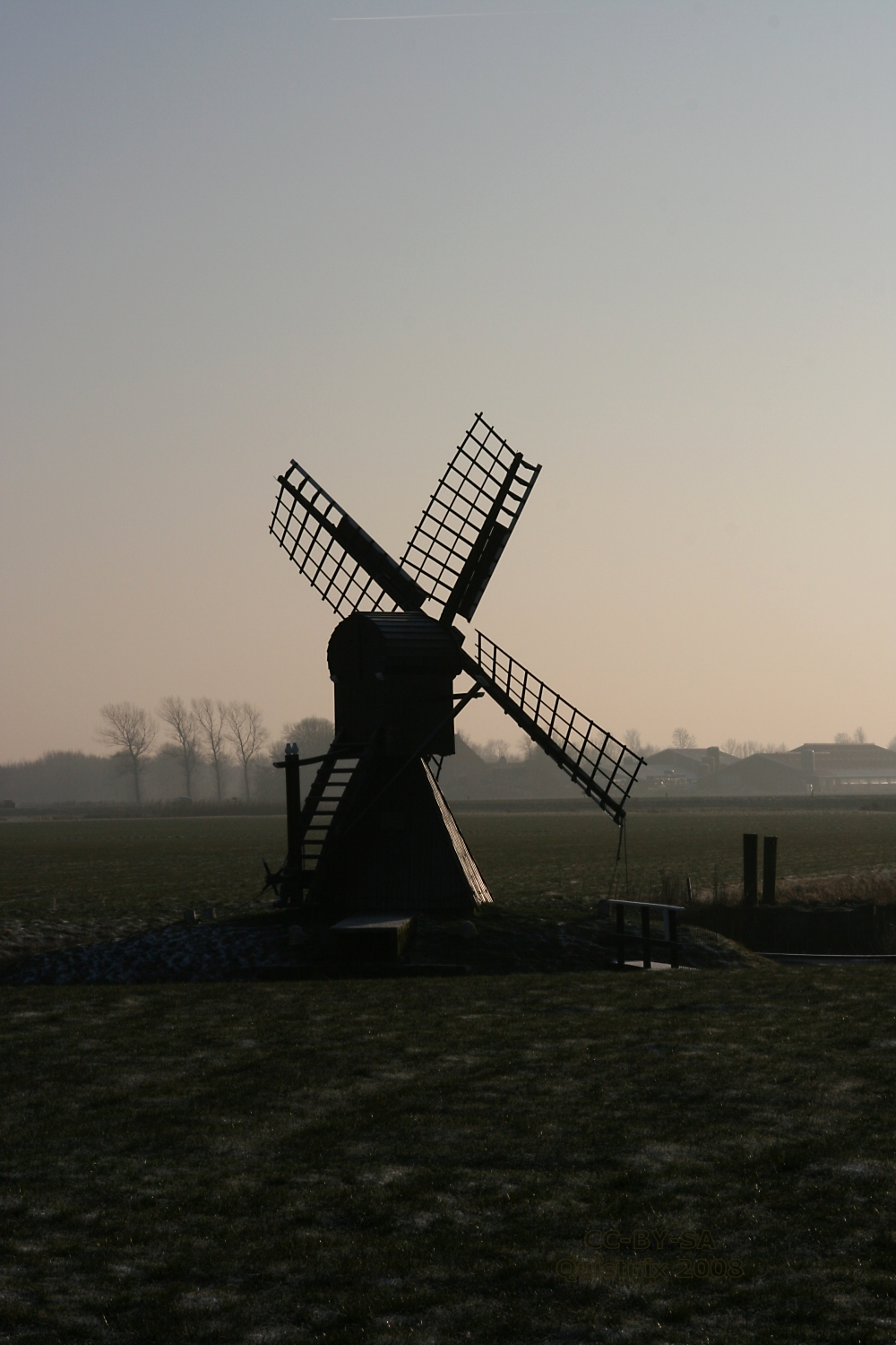 Marssum: molen Terpzigt, tegenlicht